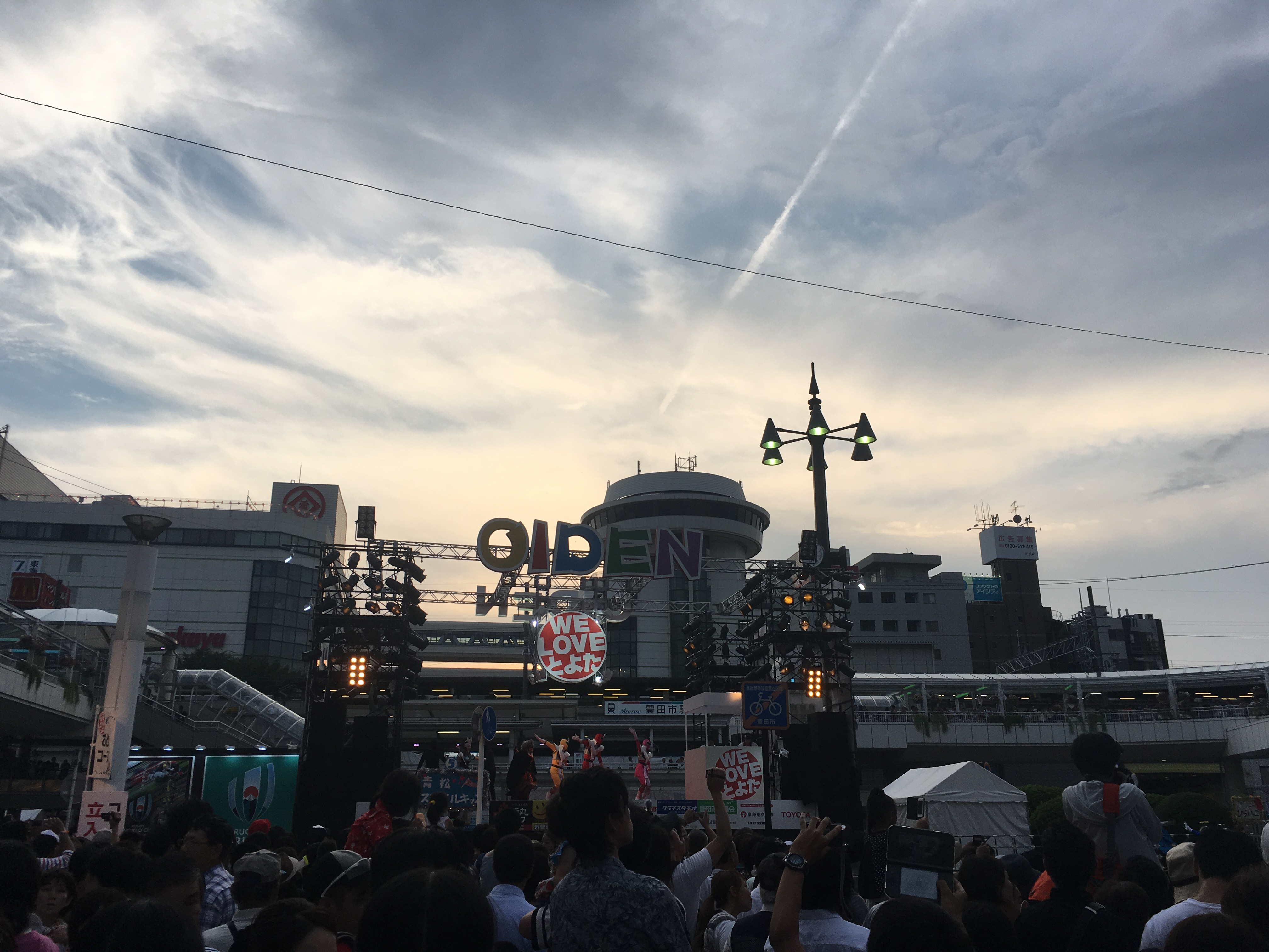 第４８回の豊田おいでん祭りの空